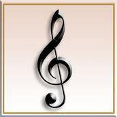 Solen klabea